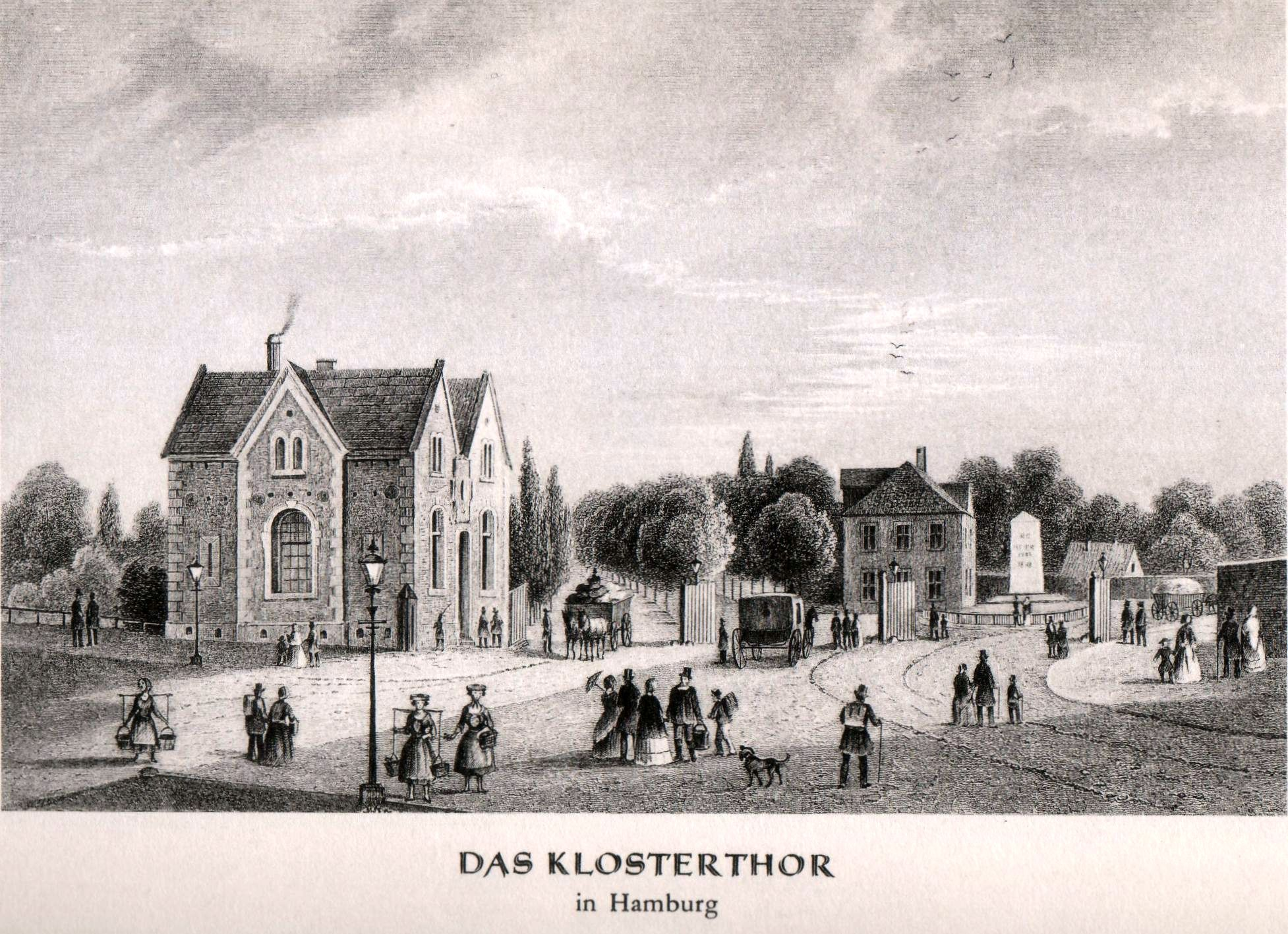 Das Klosterthor in Hamburg um 1850, gezeichnet von J. Gottheil, gestochen von J. Poppel und G. Kurz